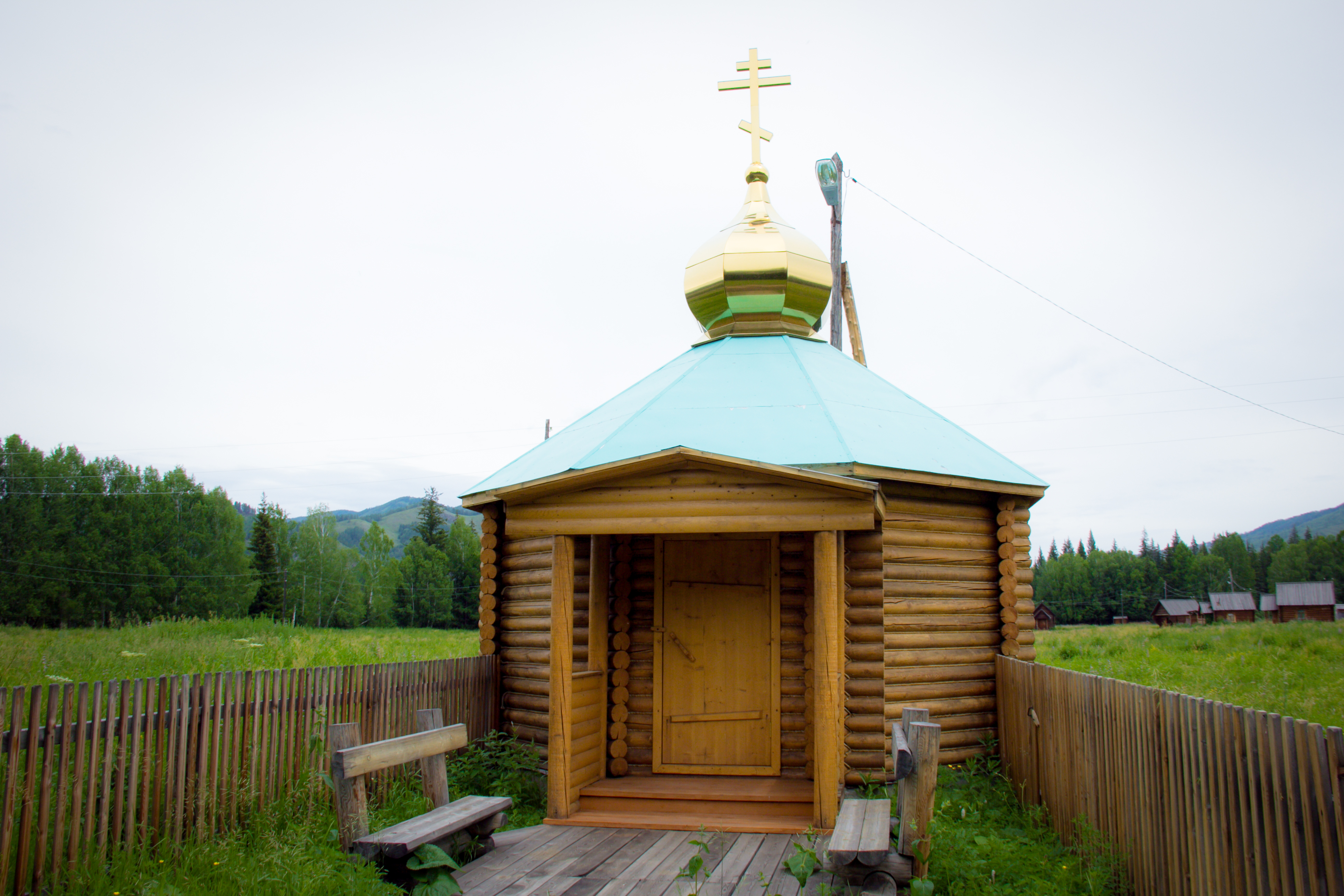 Каа-Хемский район РТ